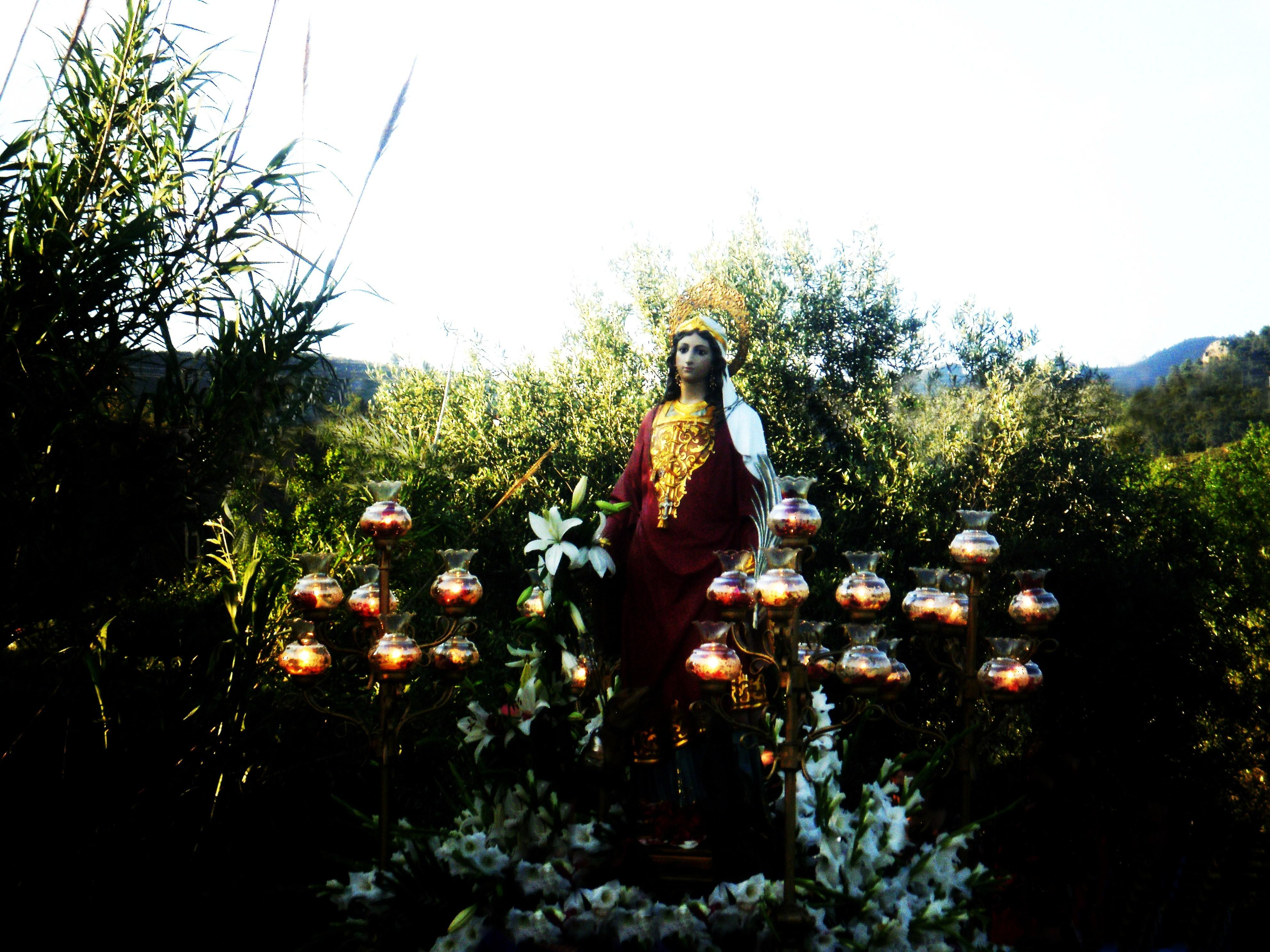 imagen de la procesión e la patrona de Calles, Santa Quiteria en mayo de 2011